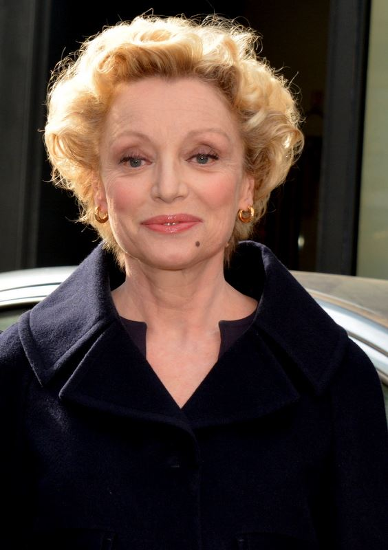 Caroline Silhol à la cérémonie des Molières